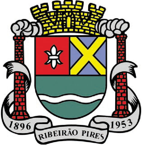 Brasão do município de Ribeirão Pires, estado de São Paulo, Brasil. Emerson